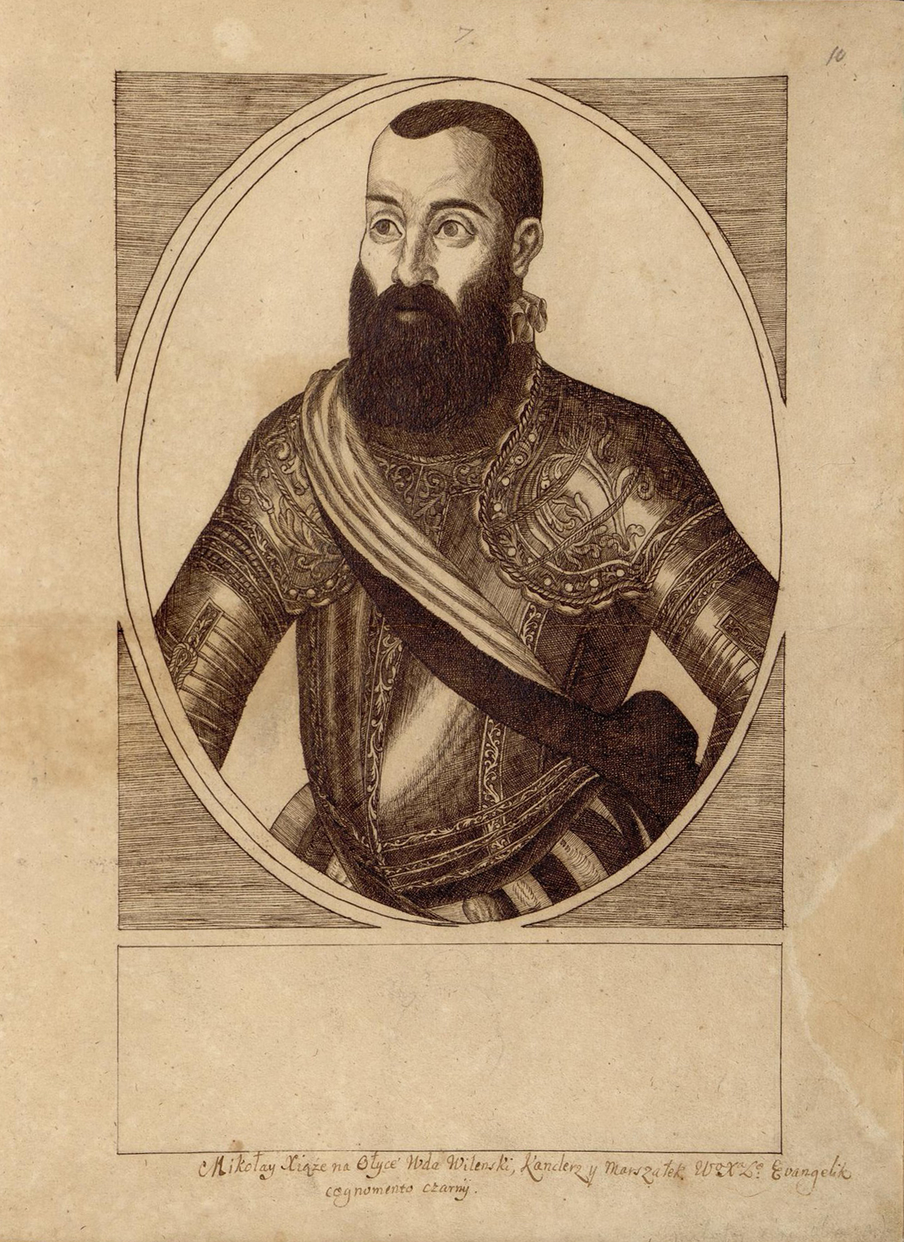 Беларуская (тарашкевіца): Партрэт Мікалая Радзівіла «Чорнага» (Mikałaj Radzivił «Čorny»)